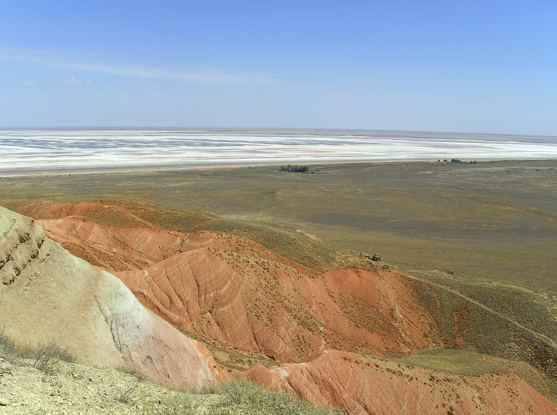 Die roten Felsen am Fuße des Bolschoje Bogdo. Im Hintergrund ist ein Teil des Salzsees Baskuntschak zu sehen.